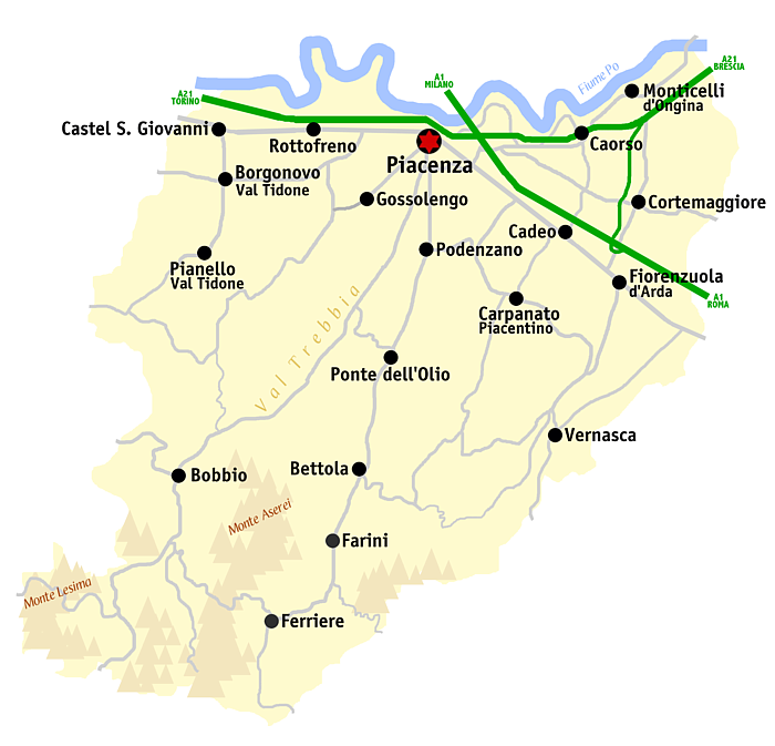 Kaart van de provincie Piacenza